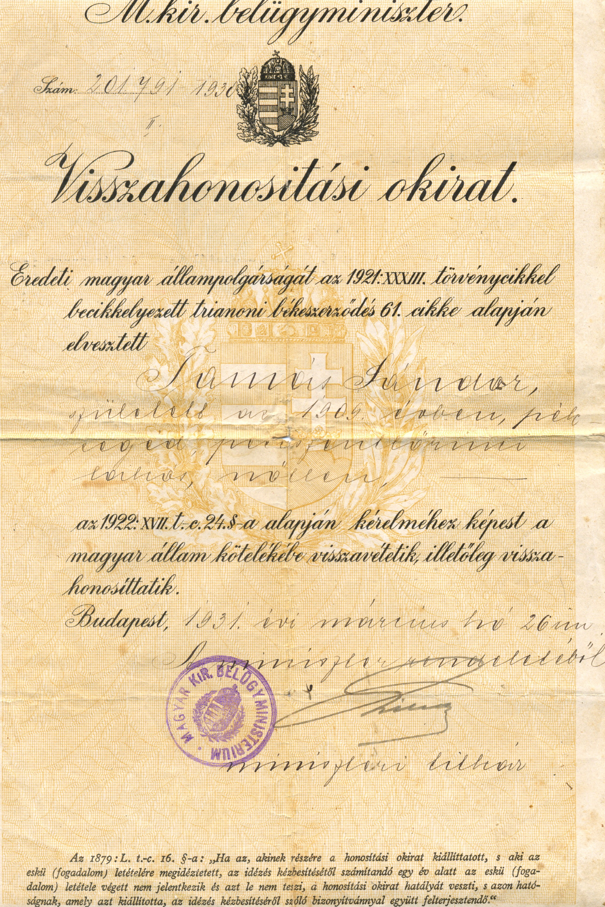 A trianoni békeszerződéssel elvesztett állampolgárság visszahonosítása.